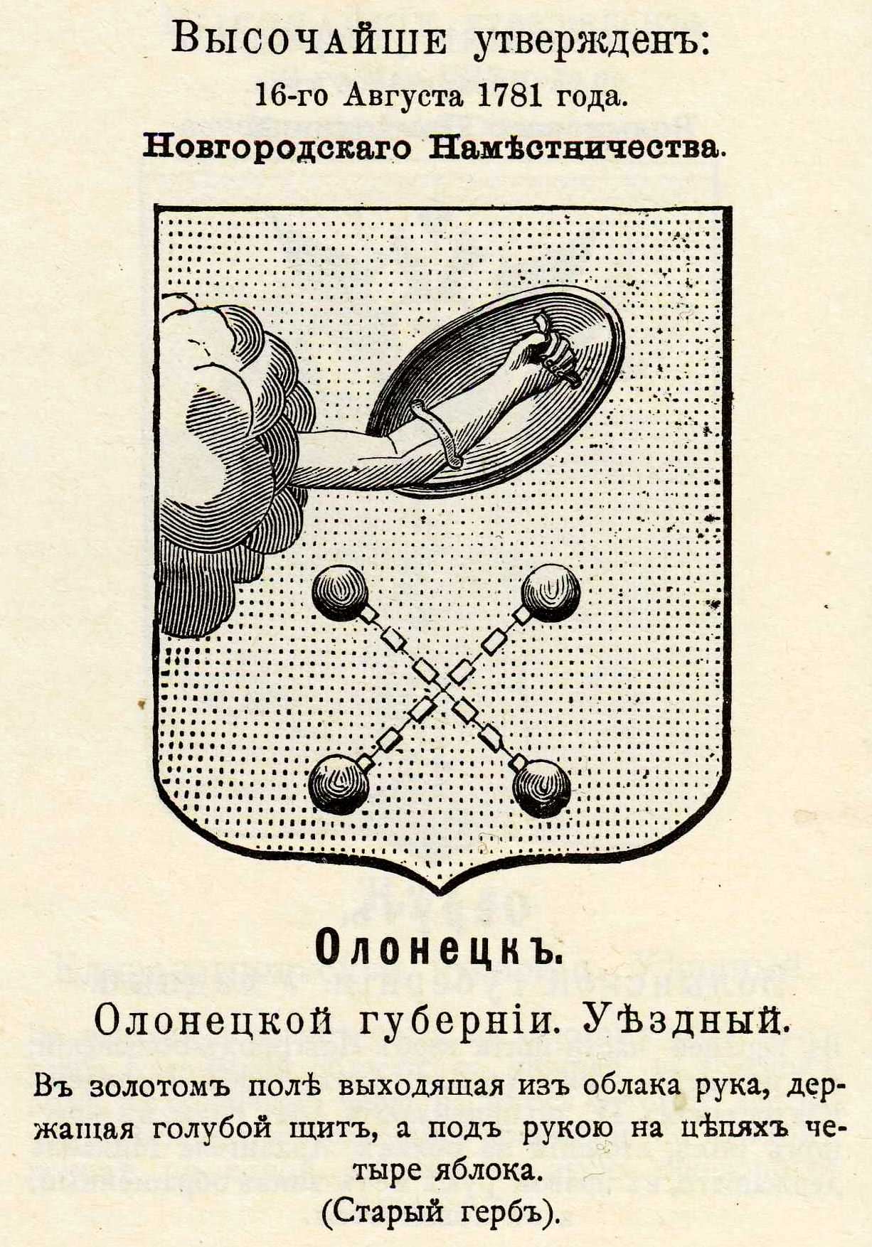 Герб Олонецка с официальным описанием в Гербовнике Винклера